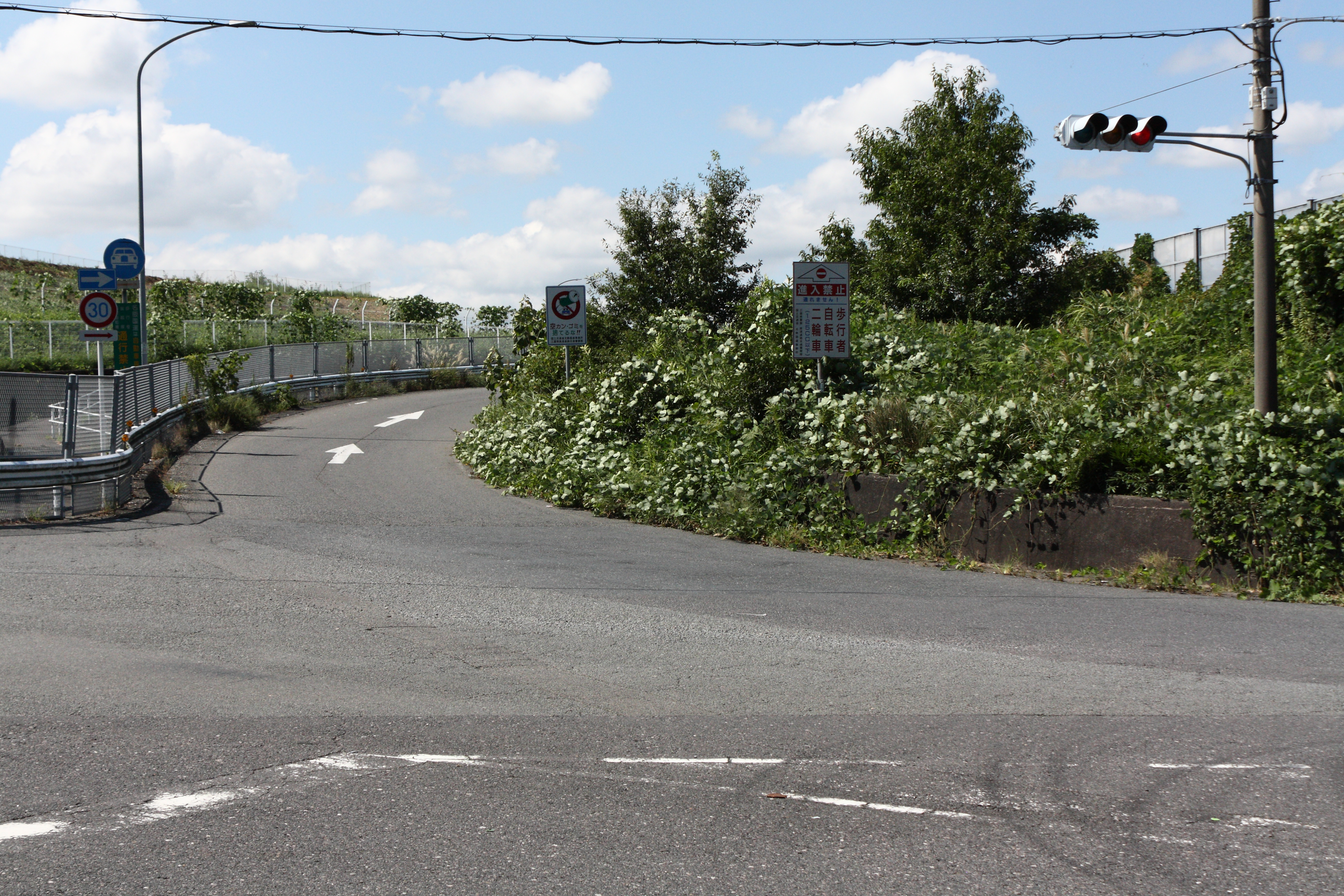 名阪国道 伊賀一之宮インターチェンジ（ダイヤモンド型） 天理方面入口 三重県伊賀市千歳